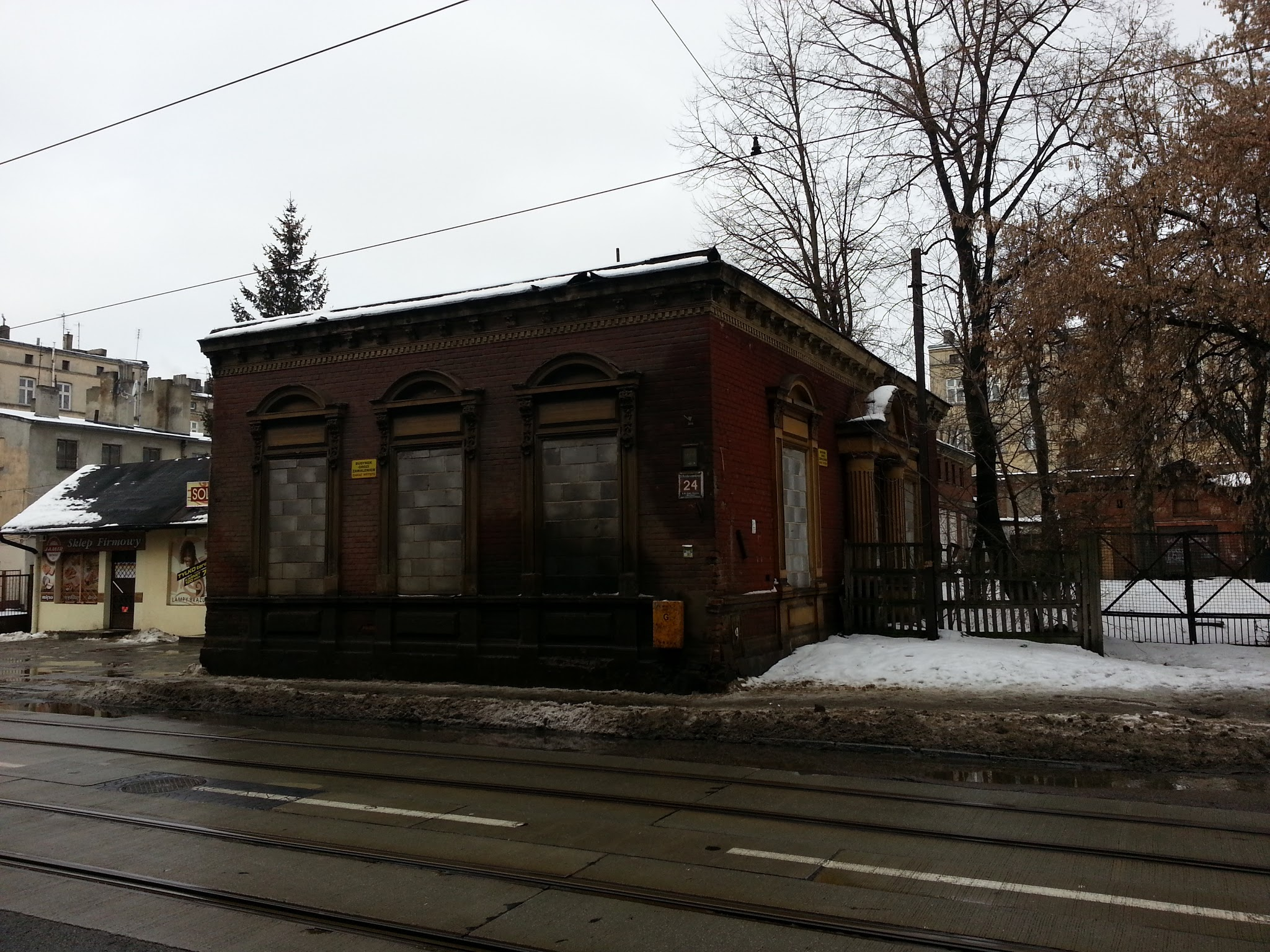 Dom Adolfa Steinerta przy ul. Stanisława Przybyszewskiego 24 w Łodzi.